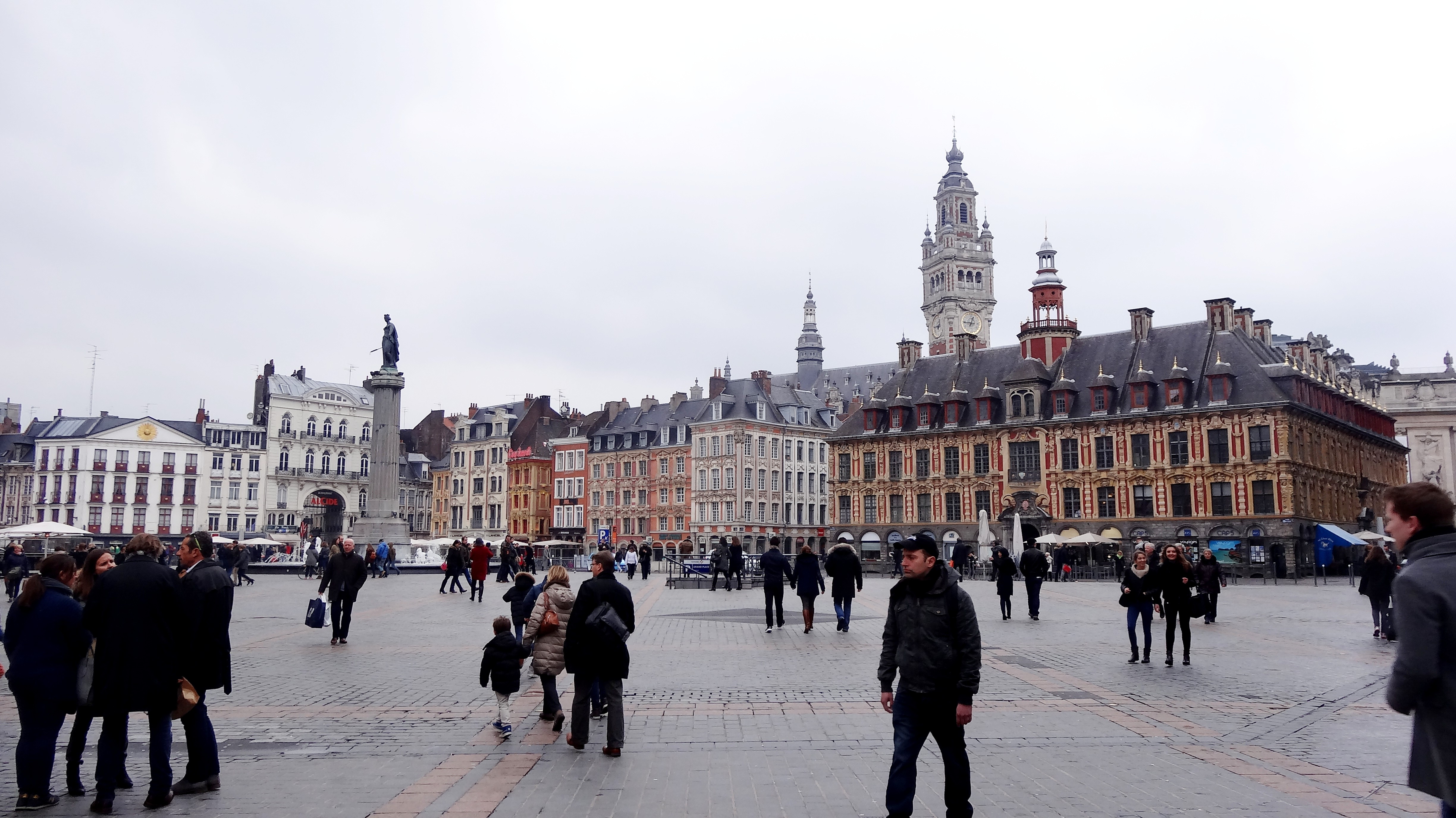 France - Lille